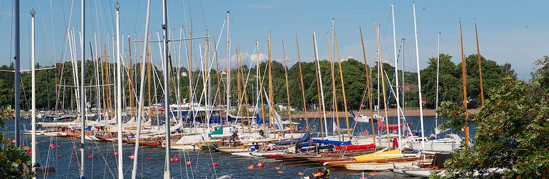 Heslingfors Segelsällsap - marina